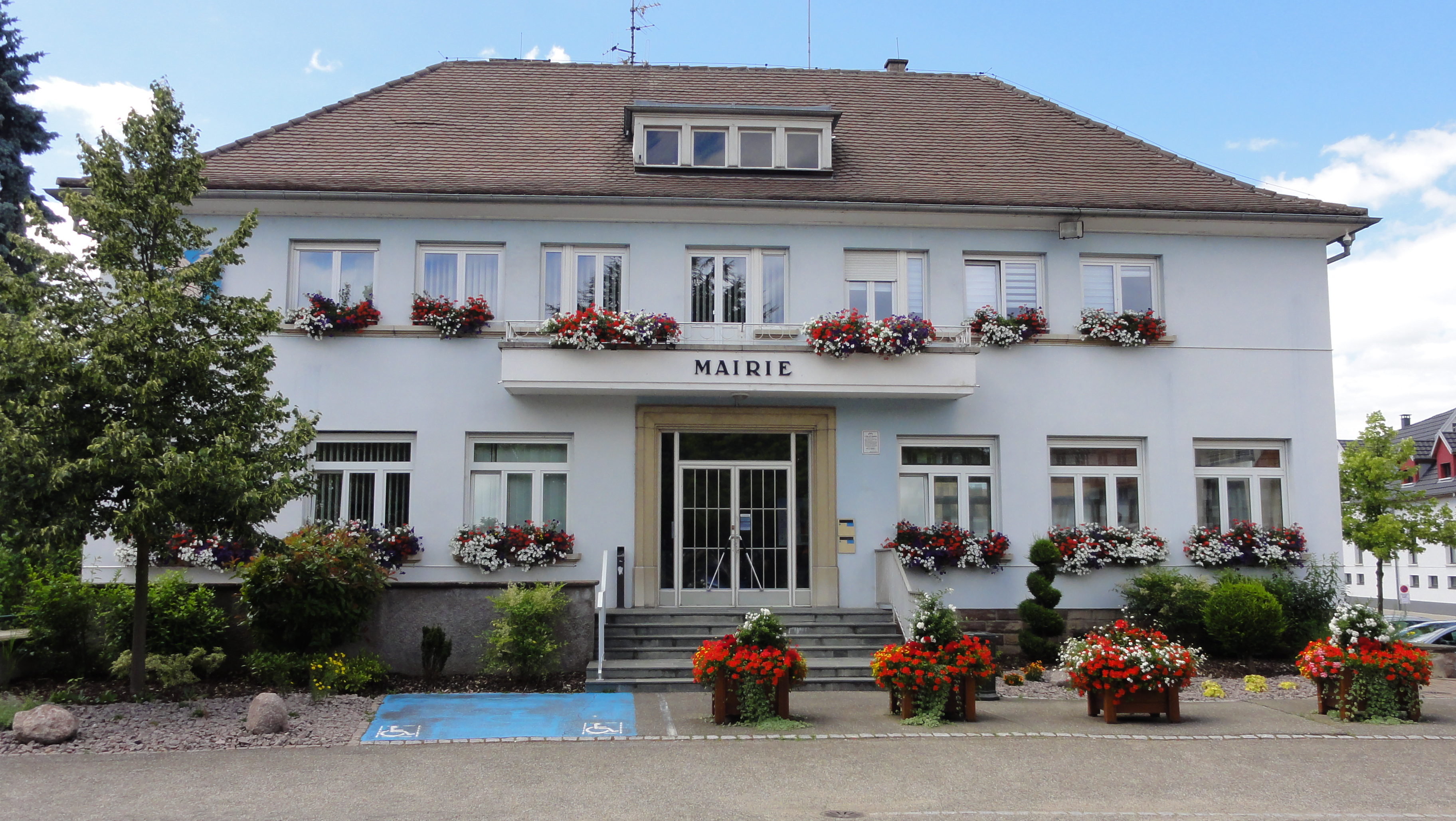 Alsace, Bas-Rhin, Oberhausbergen, Mairie (XXe).